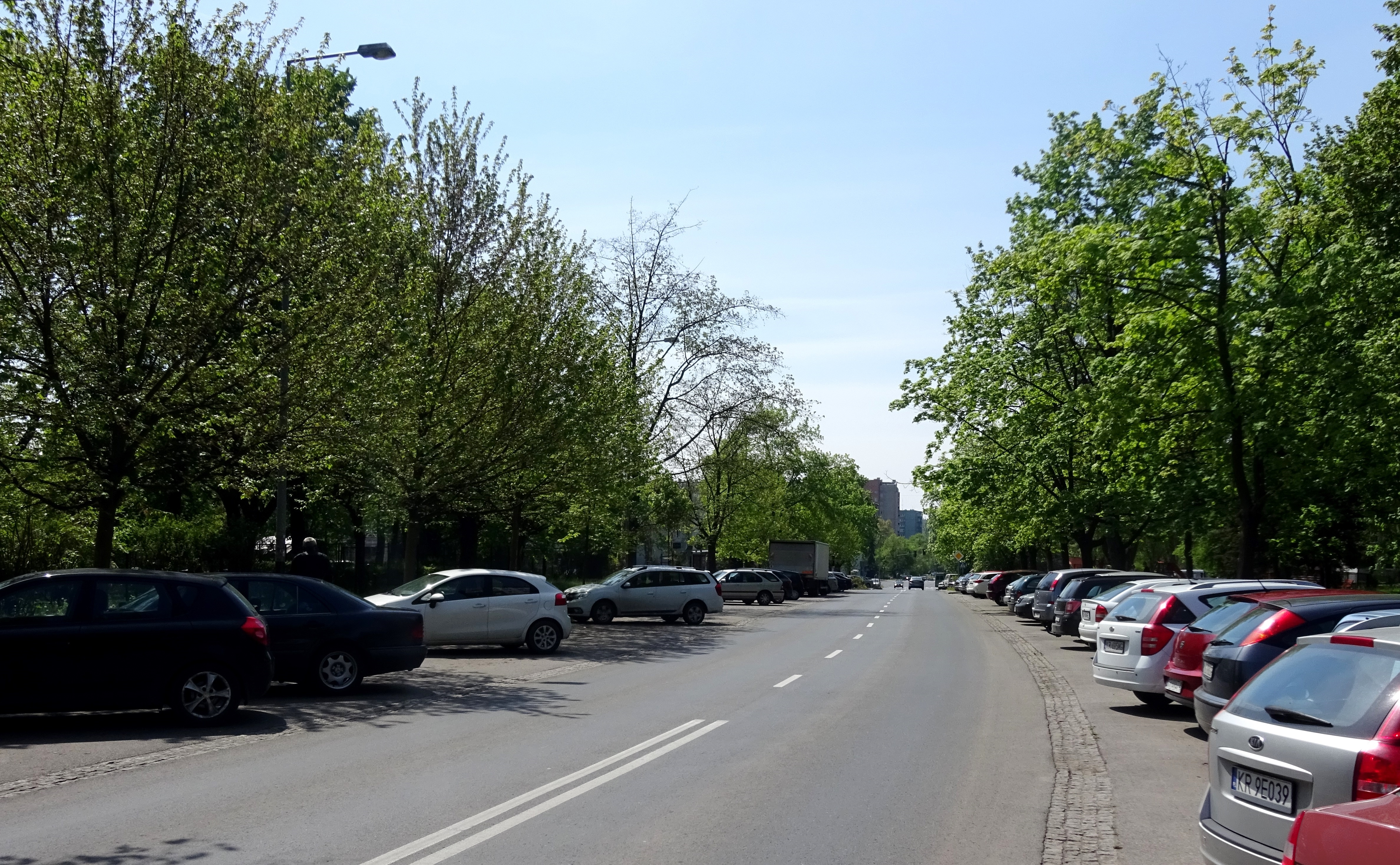 Ulica Xawerego Dunikowksiego w Krakowie. Widok w kierunku południowym.